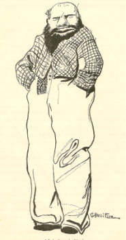 Carl Leopold Hollitzer Gedächtnis Ausstellung